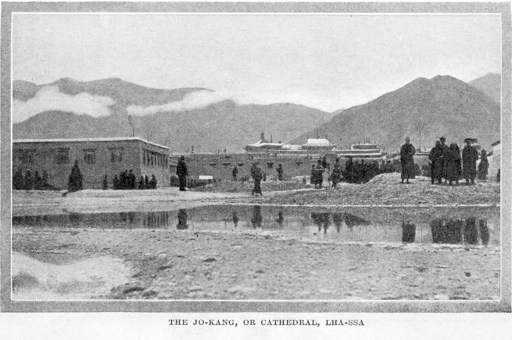 Jokhang_-_mid_1840s